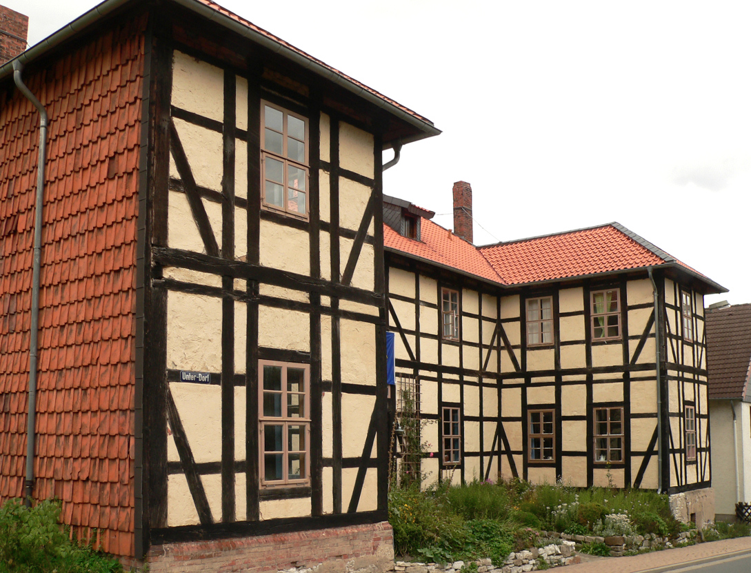 Die Fayence-Manufaktur Wrisbergholzen am Tag des offenen Denkmals 2011